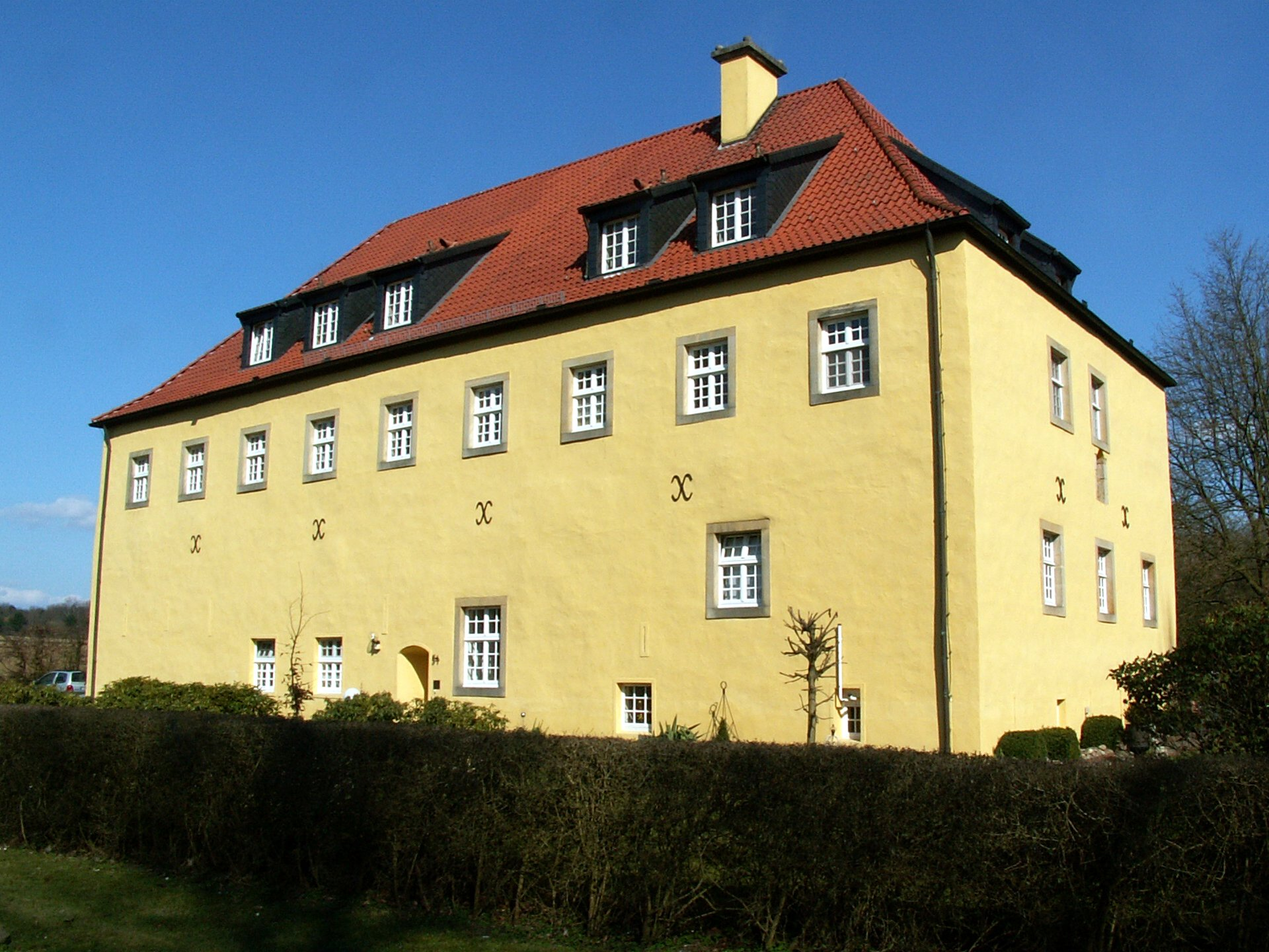 Haus Gartlage, Herrenhaus in Osnabrück, Stadtteil Dodesheide, Ansicht von Südwesten